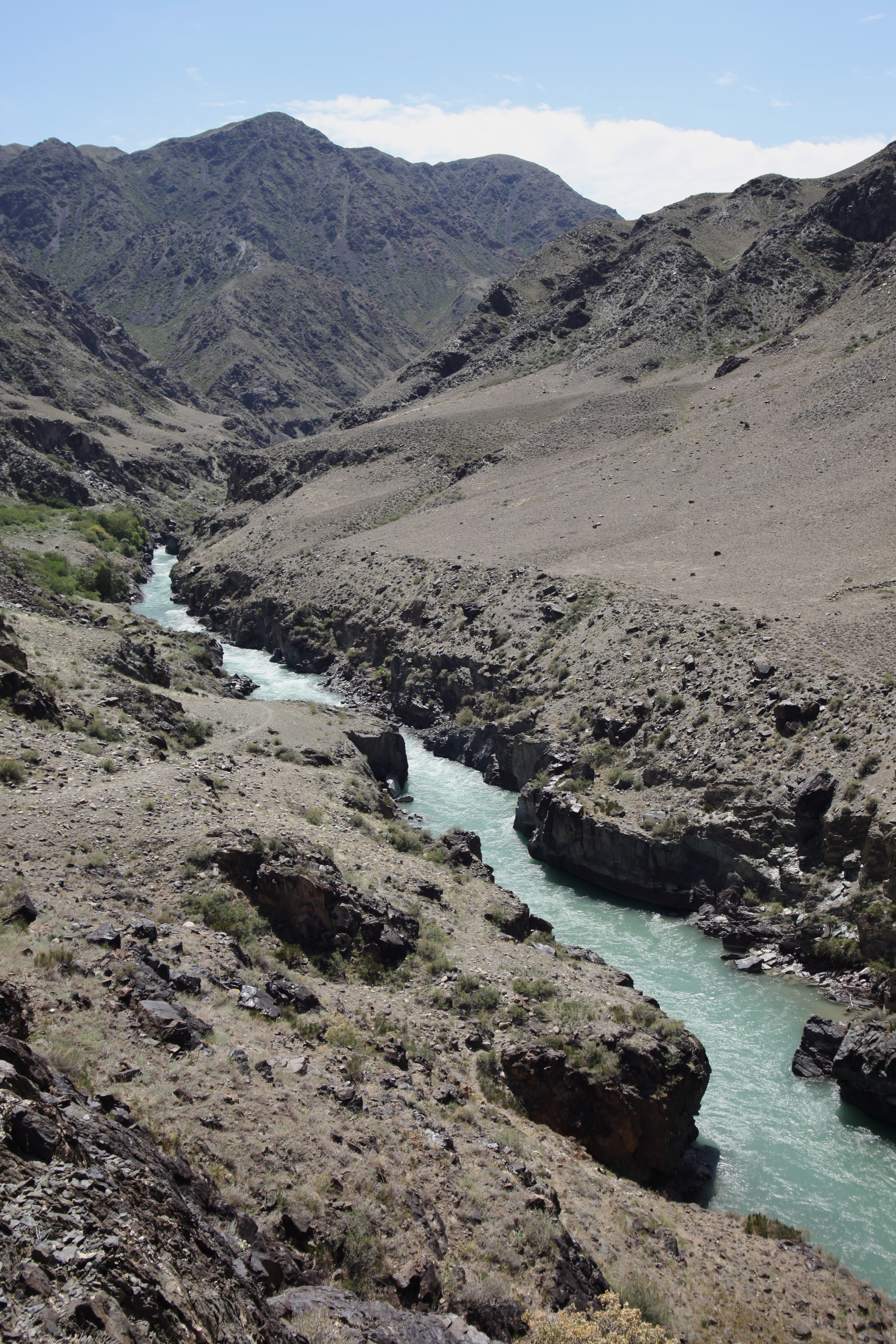 Каньон реки Чилик. 26 мая 2013 года.